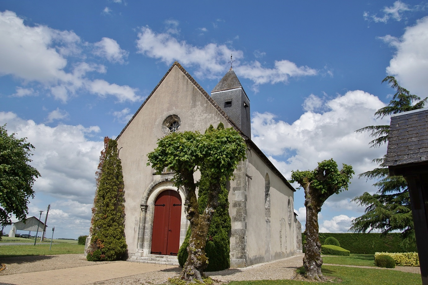 Loir et Cher